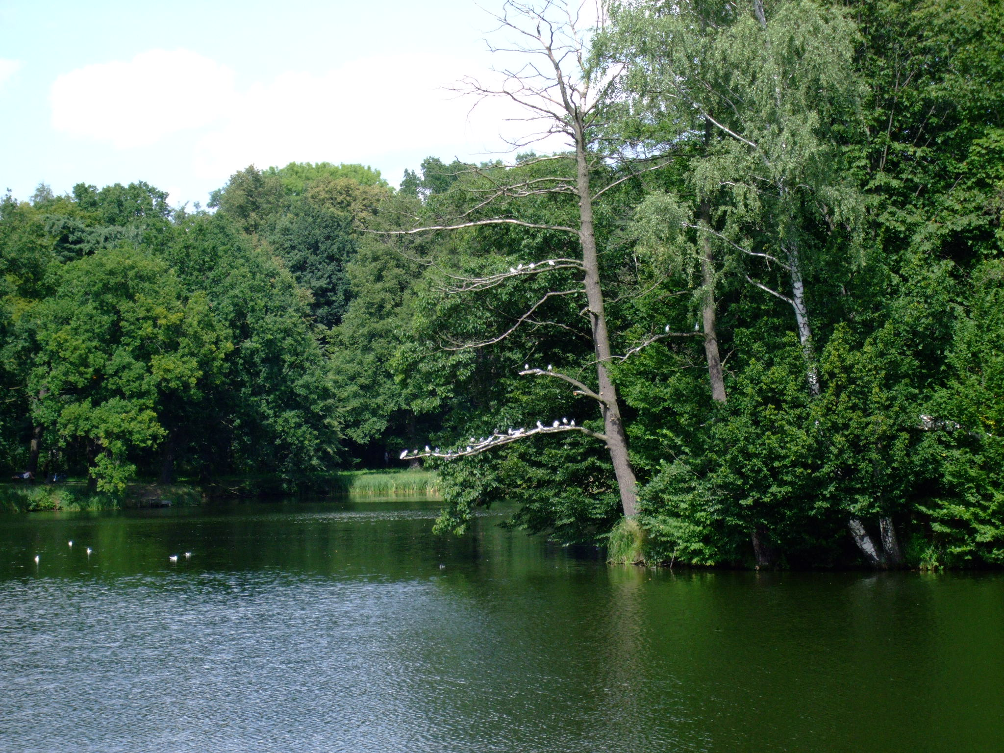 Park w Świerklańcu.